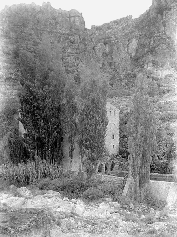 Molí de la Font Gran de Vilaverd. Enric Ribas i Virgili (Entre 1920 i 1930)